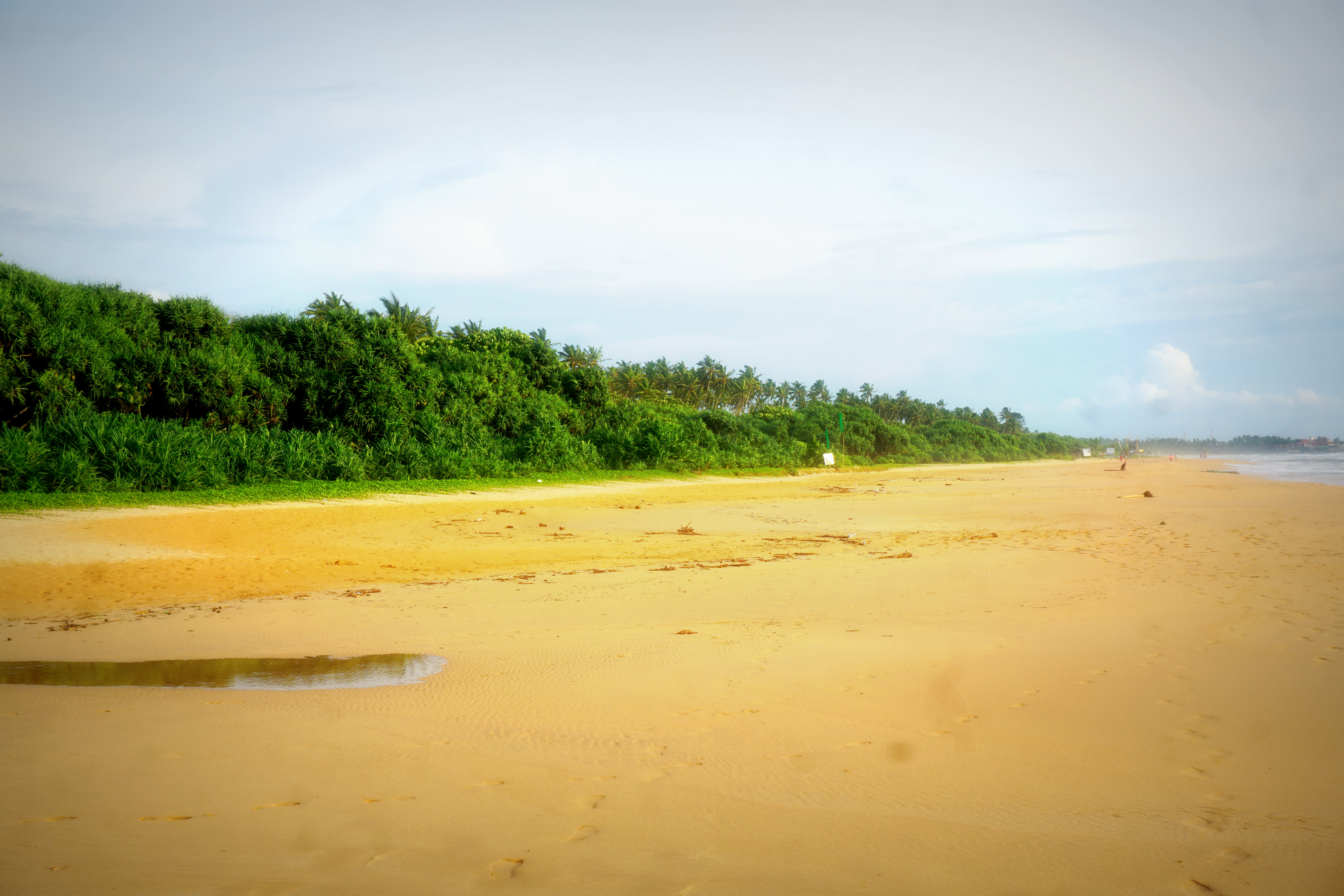 Bentota Beach